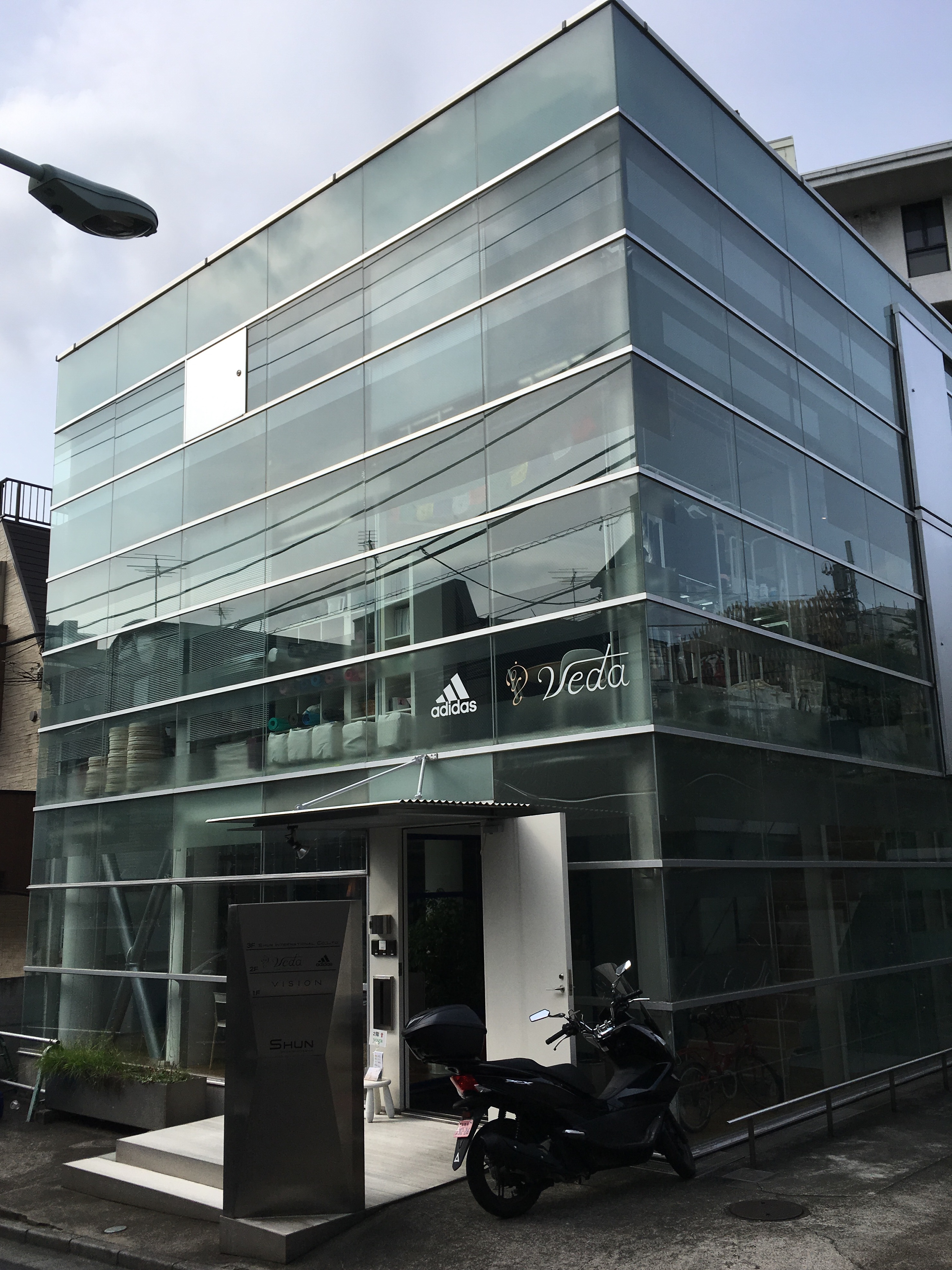 南青山にある伊東豊雄設計のビル